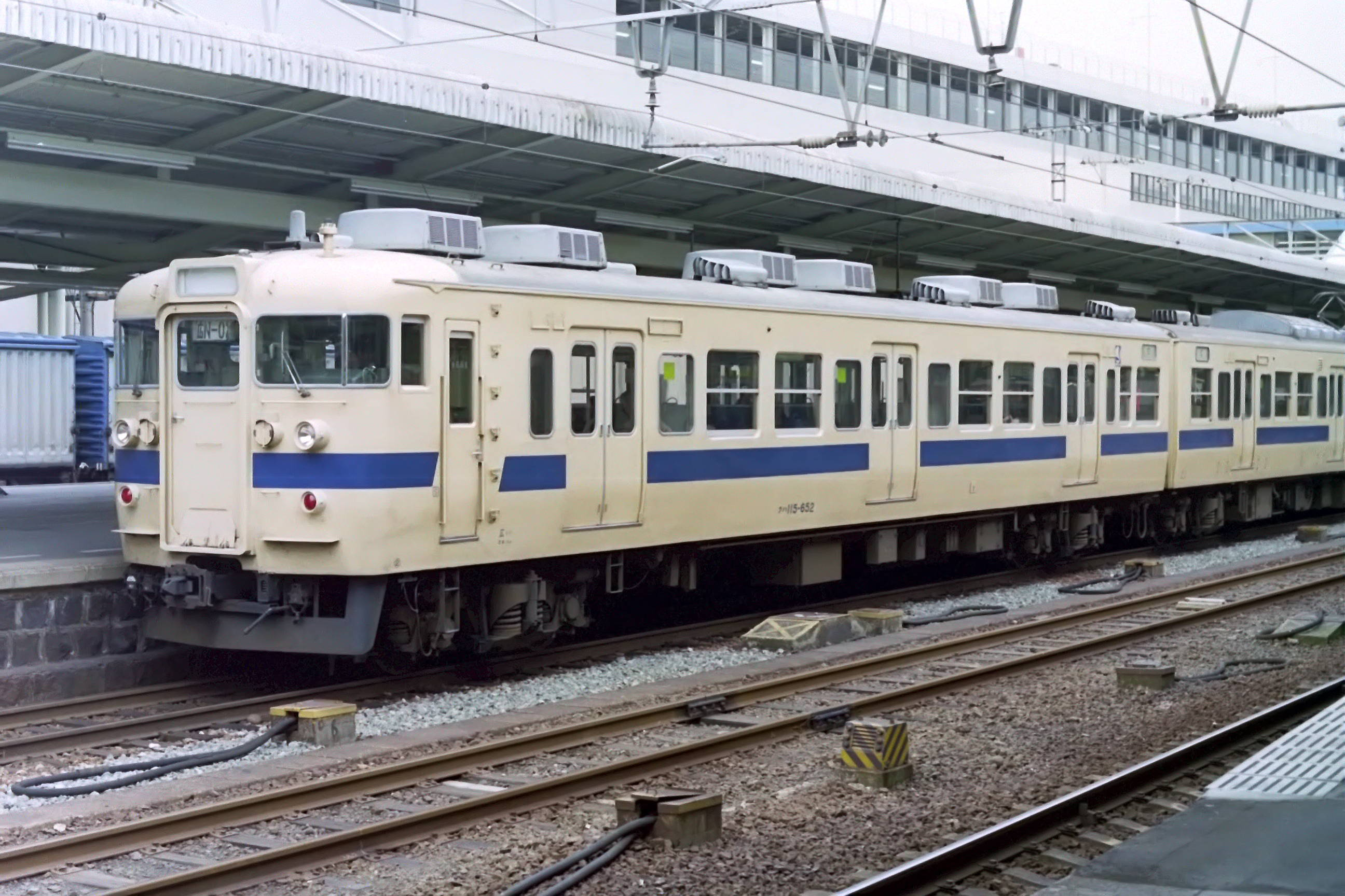 クハ115 652 広島駅